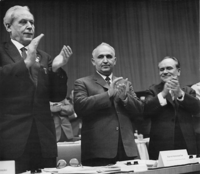 Zentralbild Kollektiv 18.1.1963 VI. Parteitag der SED vom 15.-21.1.1963 in der Werner-Seelenbinder-Halle in Berlin (4.Tag). UBz: Herzlicher Beifall nach der Grußansprache des Ersten Sekretärs des Zk der Bulgarischen Kommunistischen Partei und Vorsitzenden des Ministerrates der Volksrepublik Bulgarien, Todor Shiwkow, (Mitte). (Links): Das Mitglied des Politbüros des ZK der SED, Herbert Warnke und (rechts) das Mitglied des Politbüros des ZK der SED, Bruno Leuschner. (Schaar)